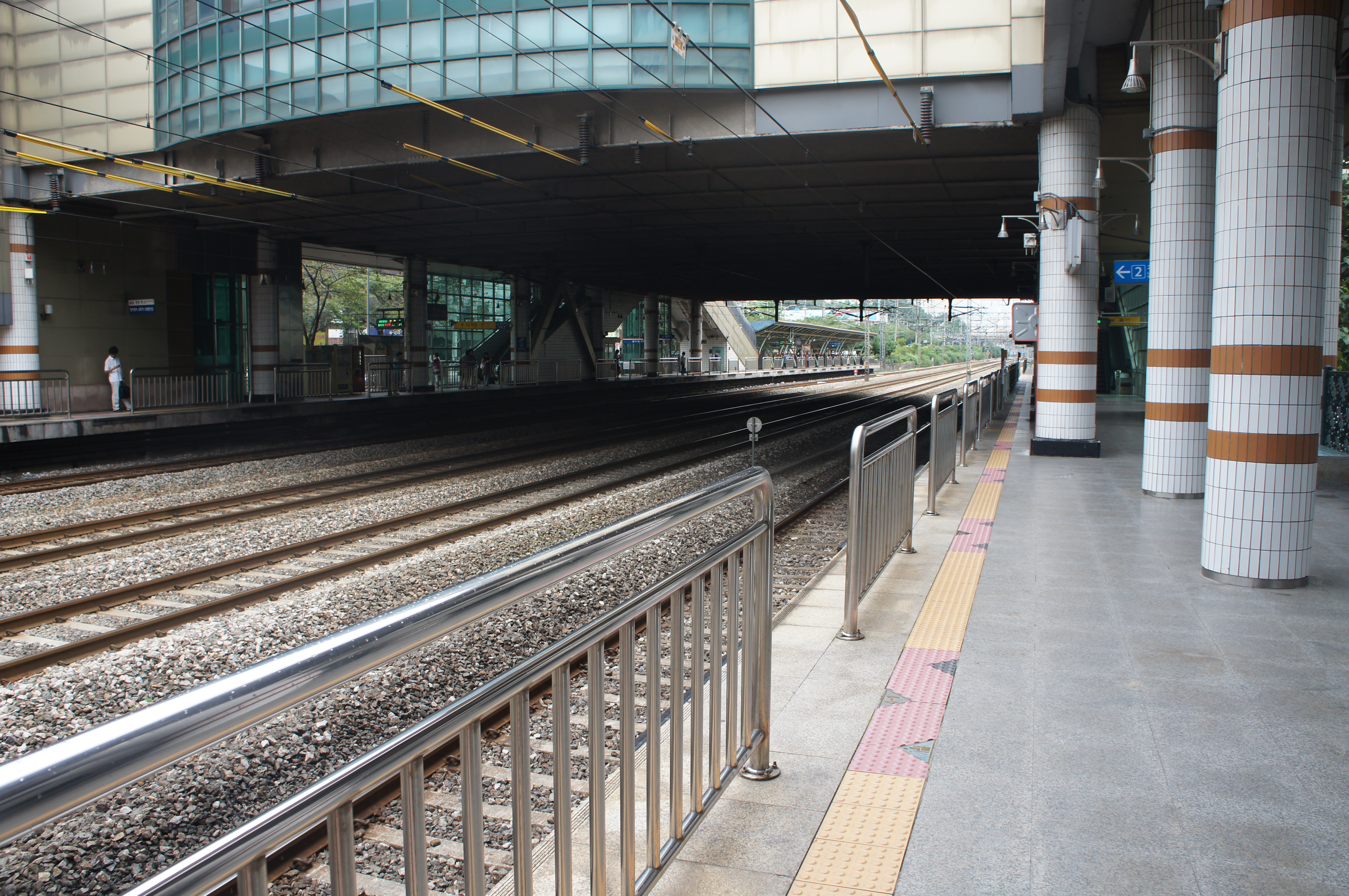 독산역 승강장